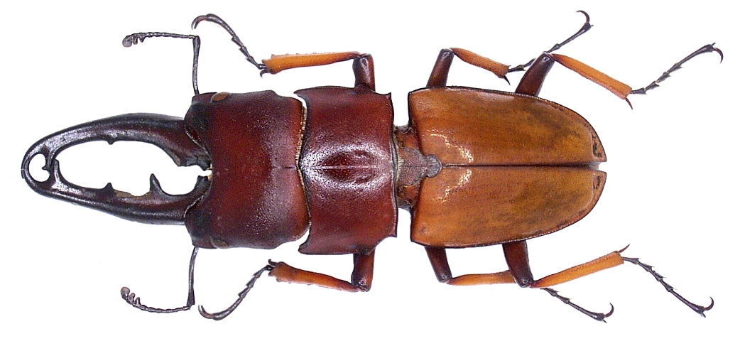 Familie: Lucanidae Groesse: 25-36 mm Fundort: Brasilien, 1972 det. U.Schmidt, 2006 Photo: U.Schmidt, 2007